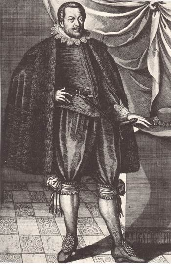 Ludwig V.